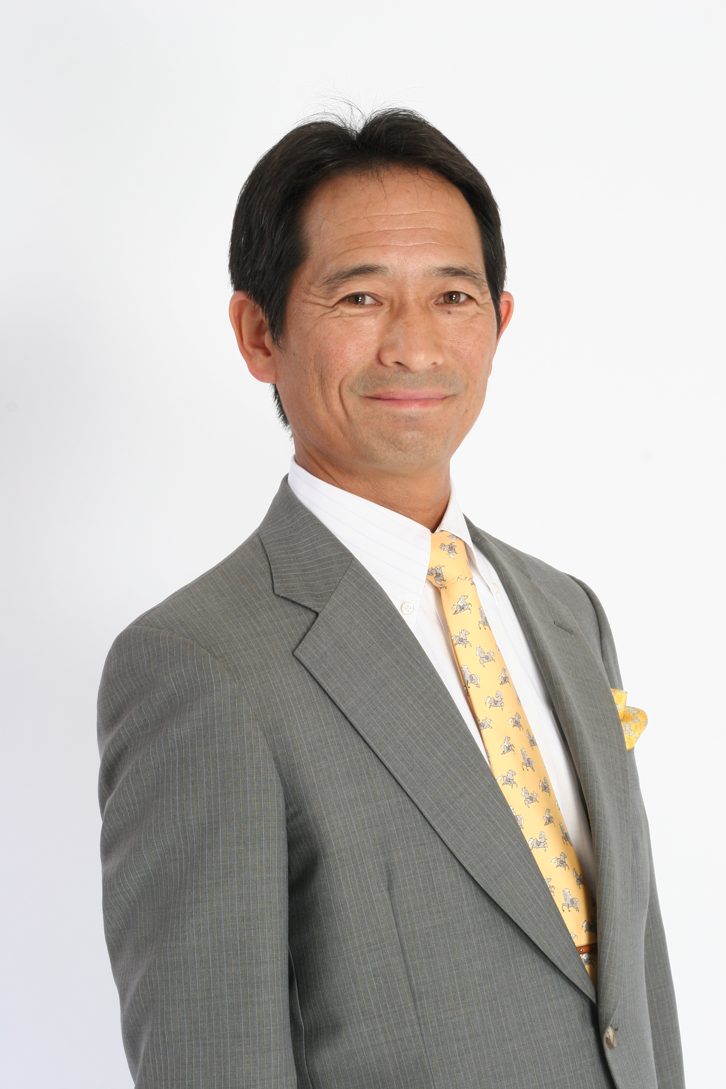 後藤浩二朗